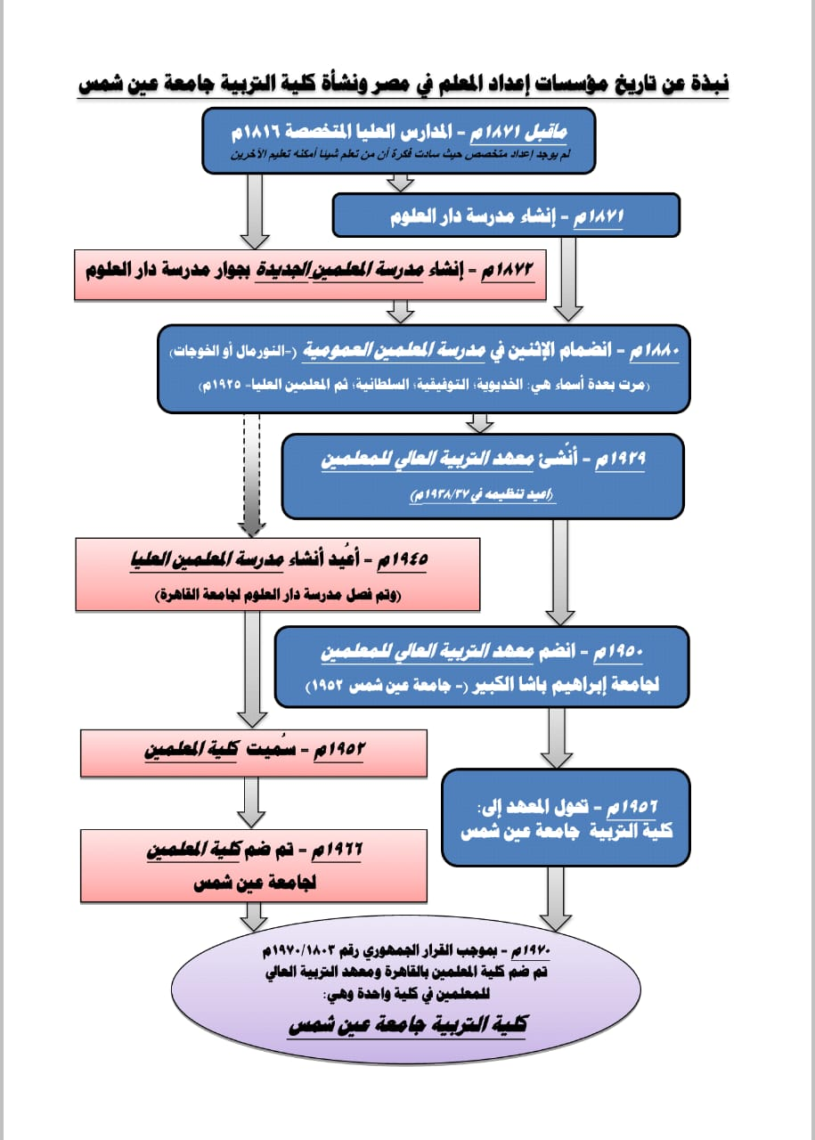 التطور التاريخي لإنشاء كلية التربية جامعة عين شمس